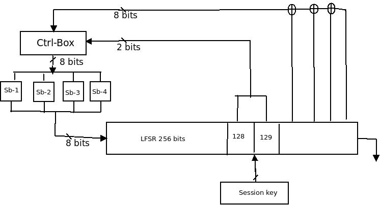 Блок-схема PALS4